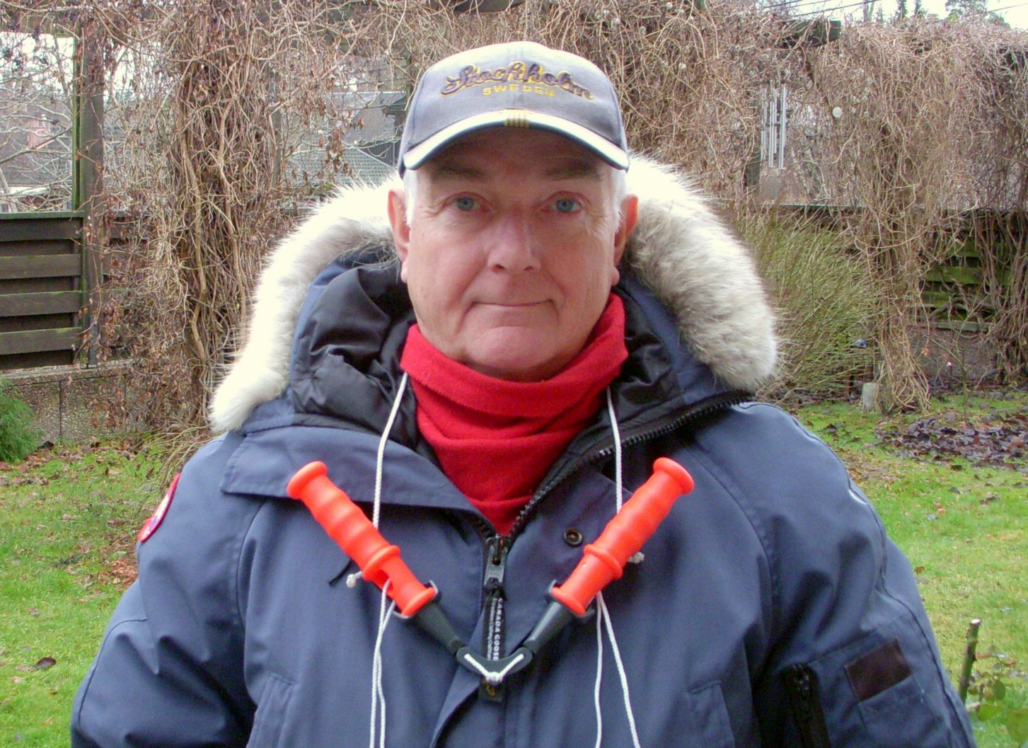 So trägt man den schwedischen Eisdorn